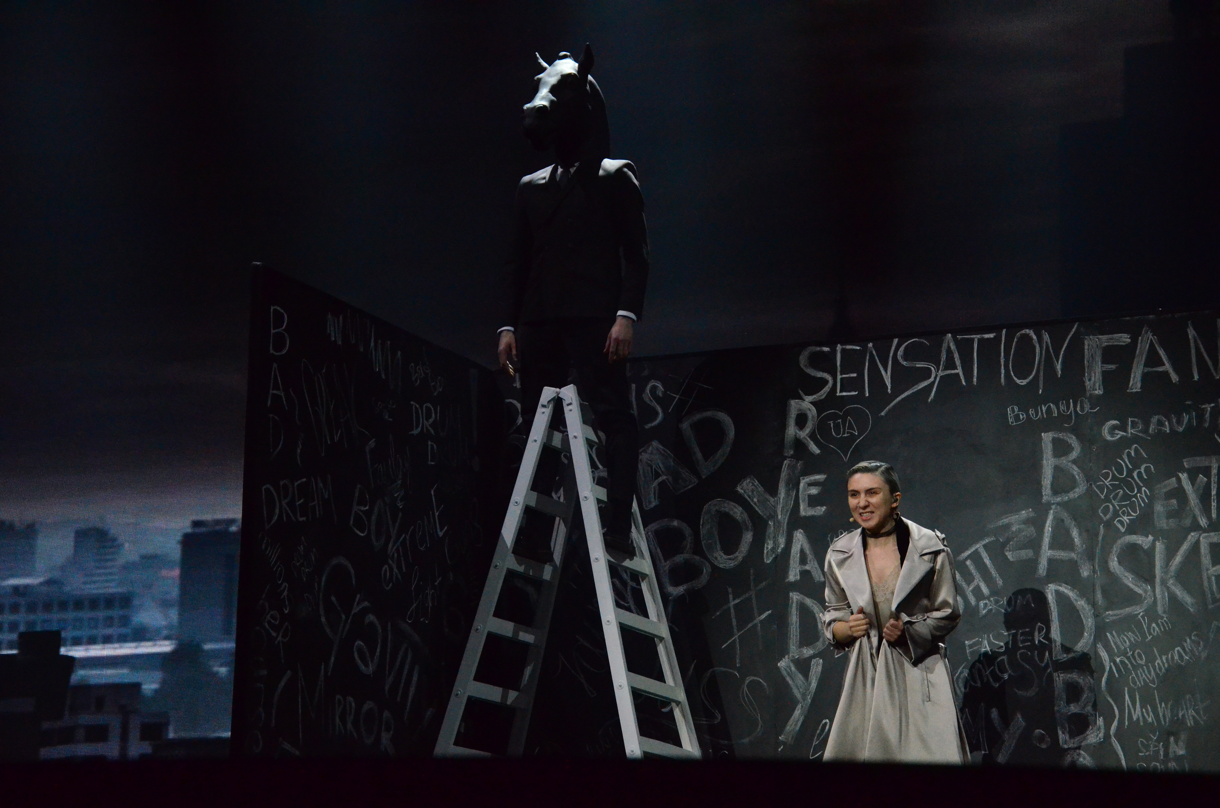 12 травня. Генеральна репетиція фіналу Євробачення 2017. Dihaj (Azerbaijan).